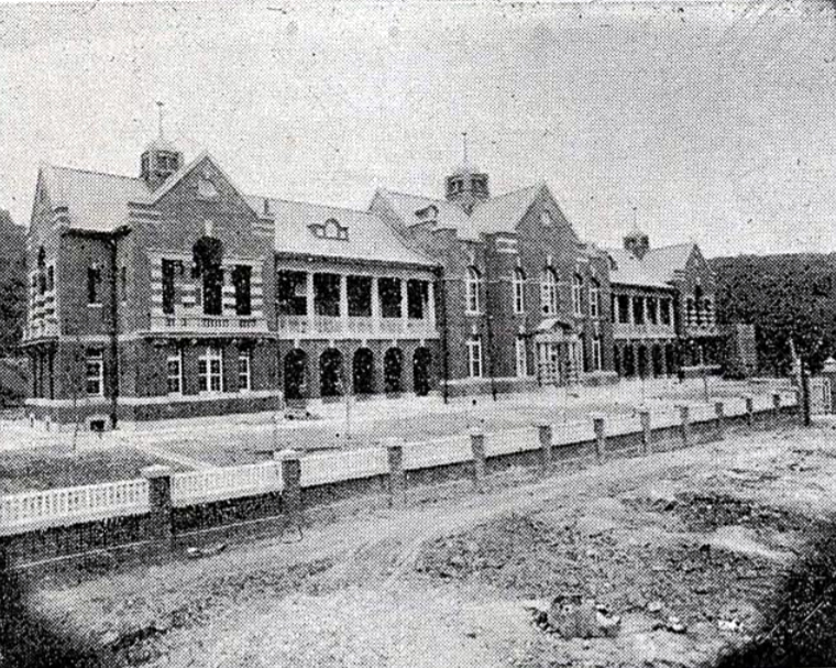 中文（台灣）: 1913年11月完工的檢糖所廳舍，位於高雄市山下町二丁目，其在1933年3月後改由台南地方法院高雄支部使用，而建築毀於二戰空襲。